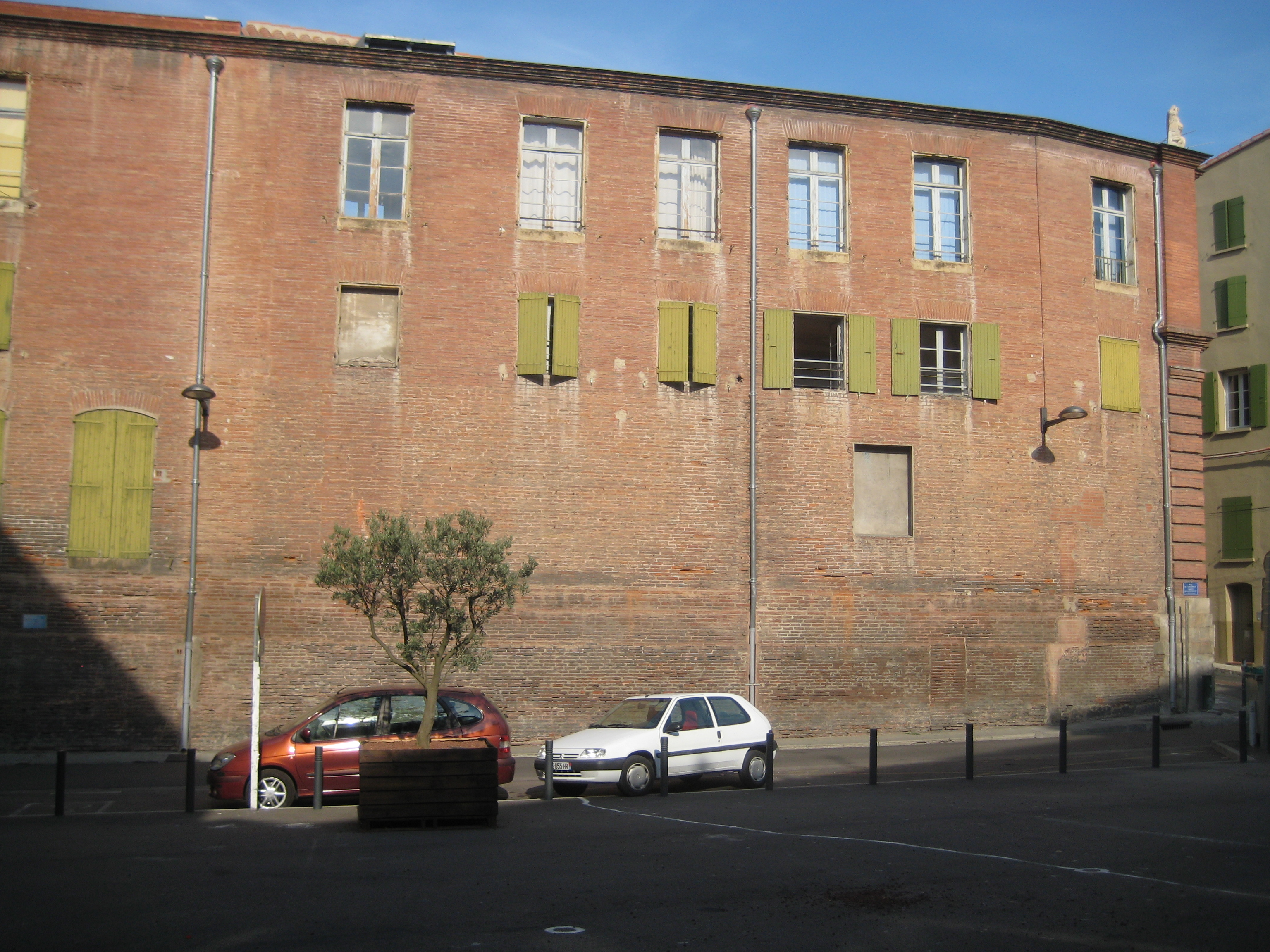 Ancienne Université de Perpignan, 1 rue du musée .